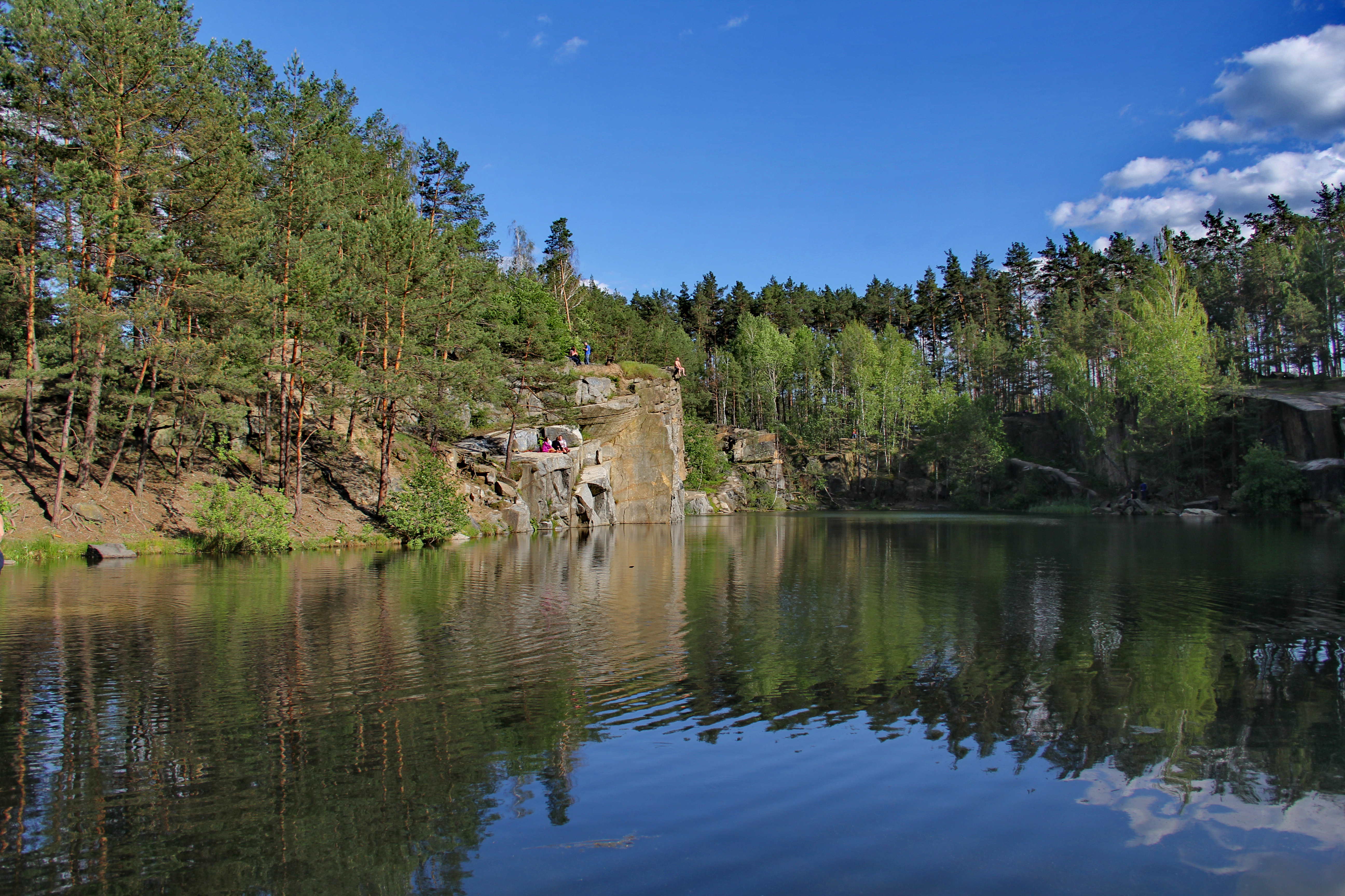 Коростишівський кар’єр, озеро.